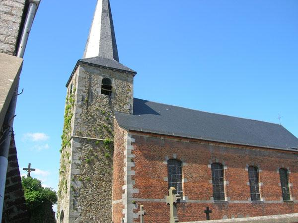 Vue générale de l'église de Croix-lez-Rouveroy